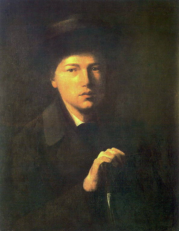 Портрет Н.Г. Криденера, брата художника